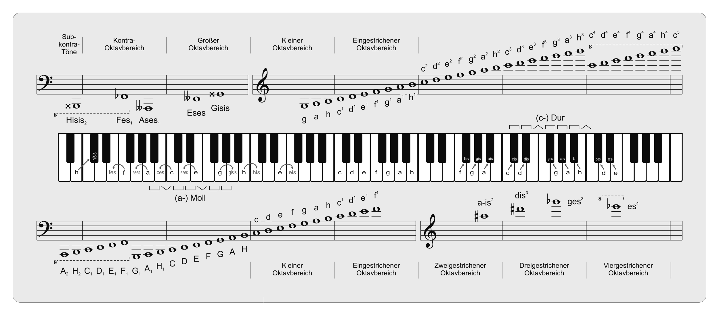 Piano - Notation